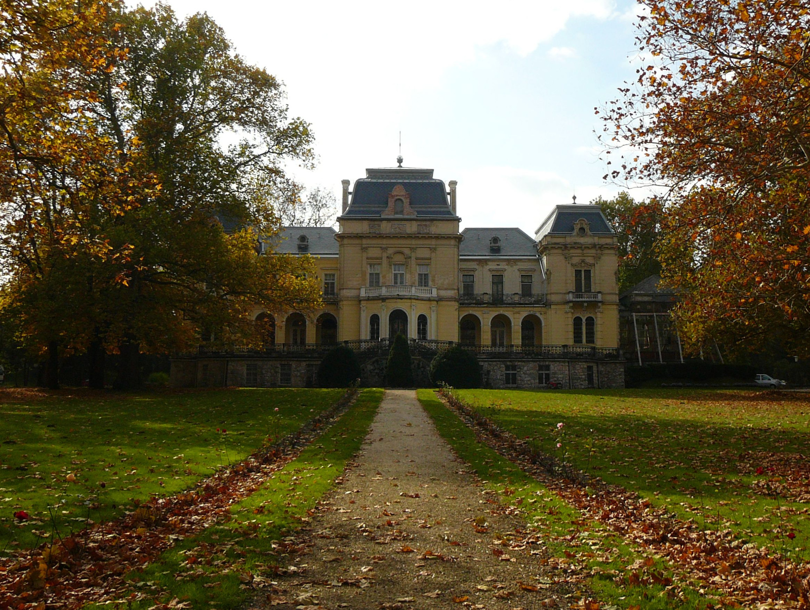 Andrássy-kastély (Tóalmás, Kókai utca 2.) This is a photo of a monument in Hungary, Identifier: 7459